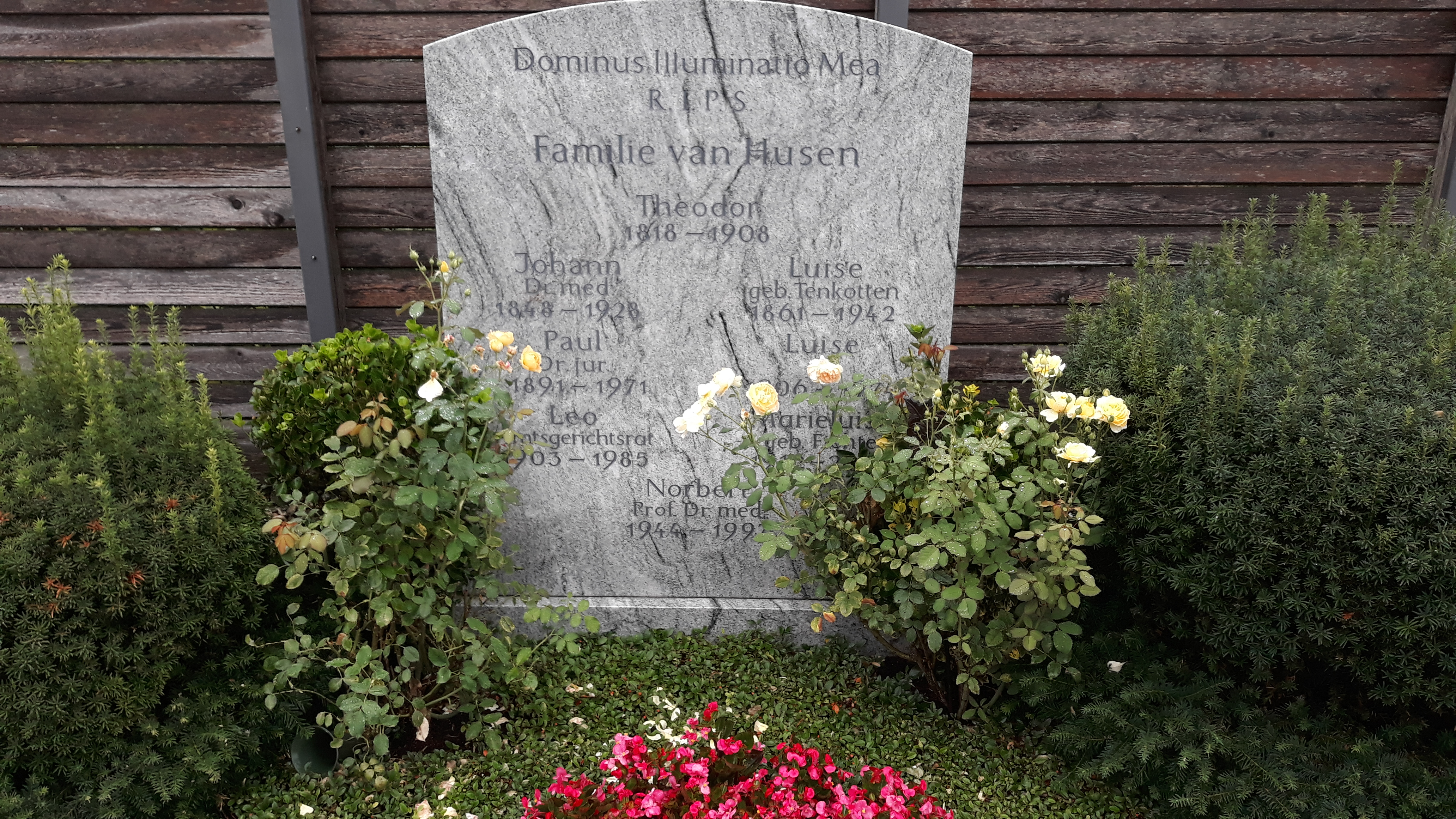 Das Grab der Familie von Husen auf dem Alten Friedhof St. Mauritz in Münster.